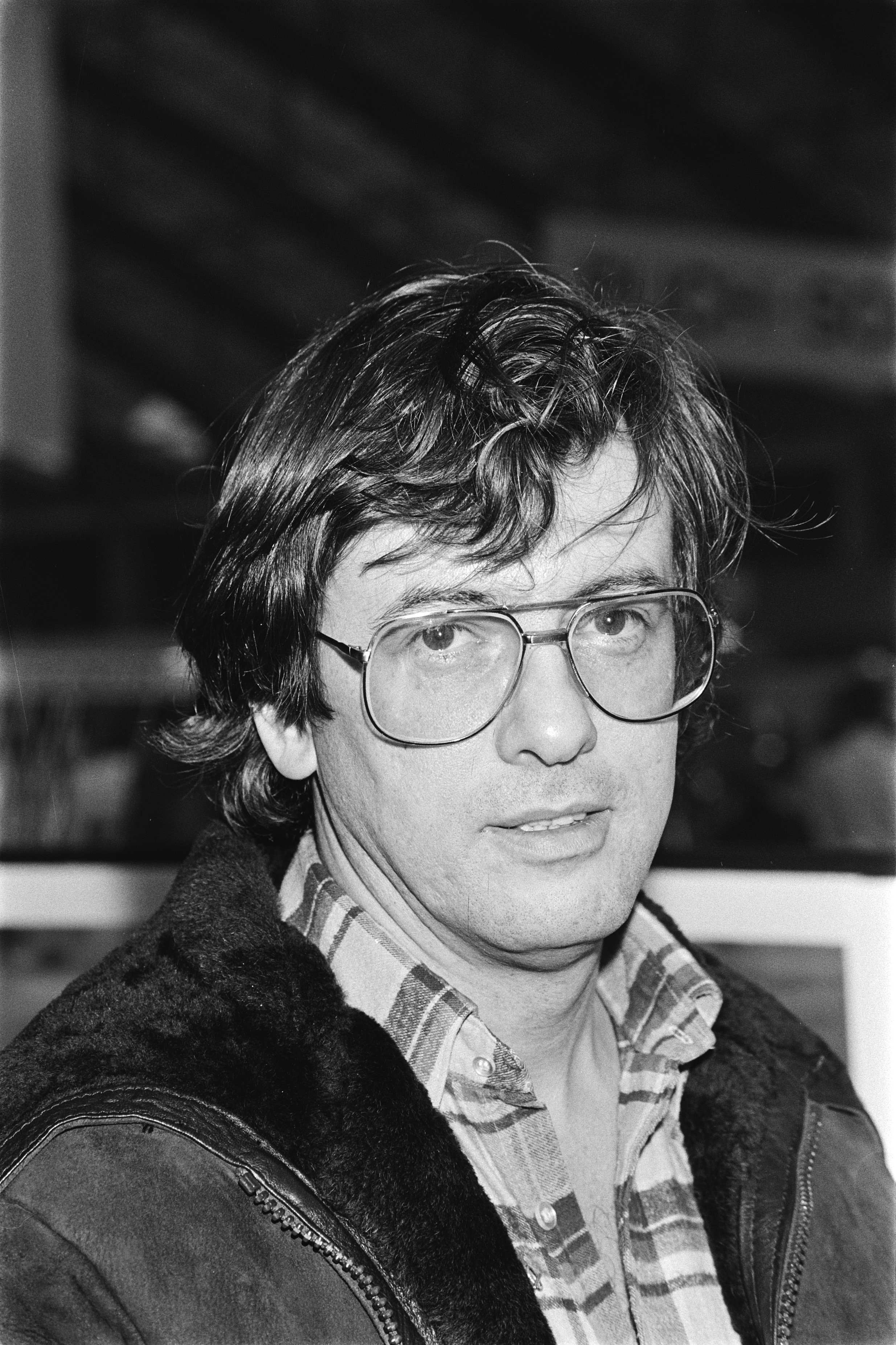 Collectie / Archief : Fotocollectie Anefo Reportage / Serie : [ onbekend ] Beschrijving : Tweewieler RAI 1980 met Pro Motor Prijs uitreiking aan filmregisseur Paul Verhoeven ; Paul Verhoeven, filmregisseur Datum : 25 februari 1980 Locatie : Amsterdam, Noord-Holland Trefwoorden : portretten, regisseurs Persoonsnaam : Verhoeven, Paul Instellingsnaam : Pro Motor Prijs Fotograaf : Dijk, Hans van / Anefo Auteursrechthebbende : Nationaal Archief Materiaalsoort : Negatief (zwart/wit) Nummer archiefinventaris : bekijk toegang 2.24.01.05 Bestanddeelnummer : 930-6877